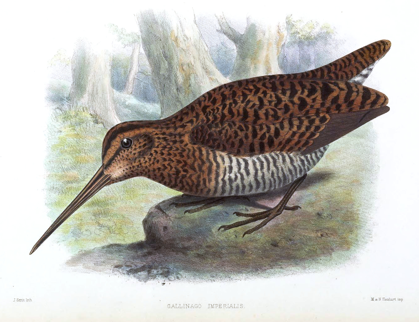 Gallinago imperialis